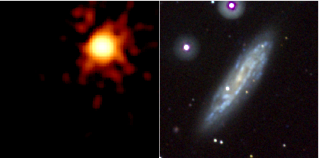 Supernova 2008D photo